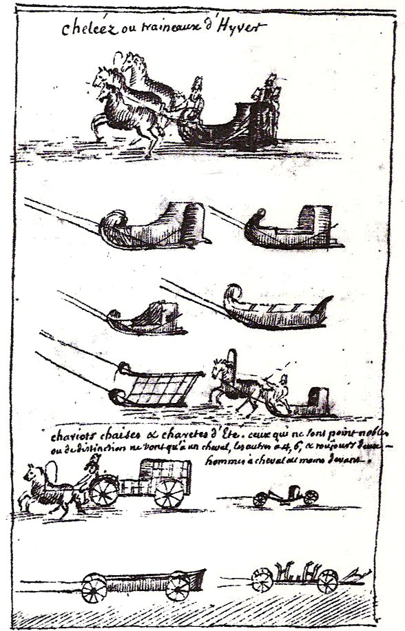 Croquis de voyage de Jacques Jubé : les traîneaux.